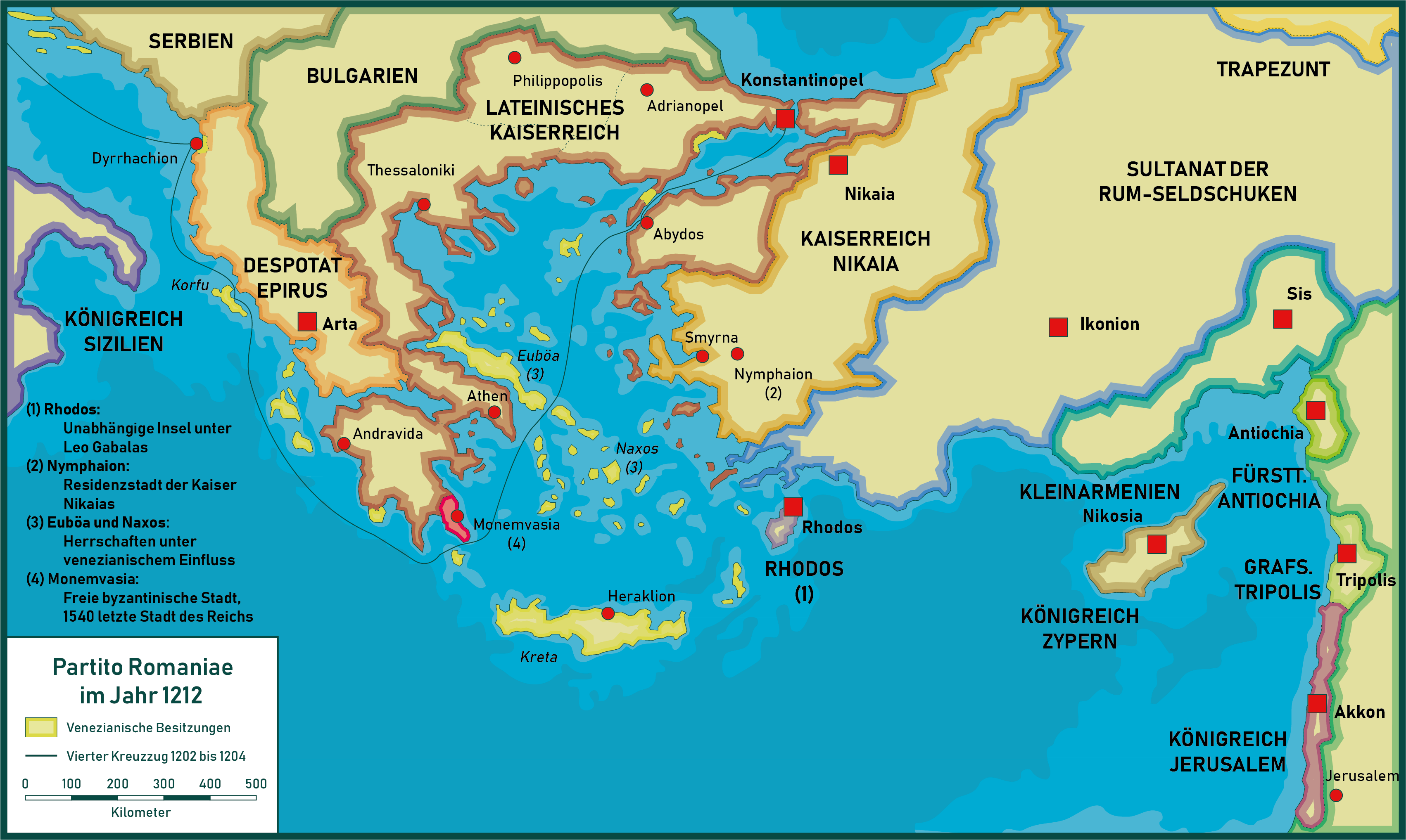 Karte der Romania im Jahr 1212 nach dem Vierten Kreuzzug gegen Byzanz.